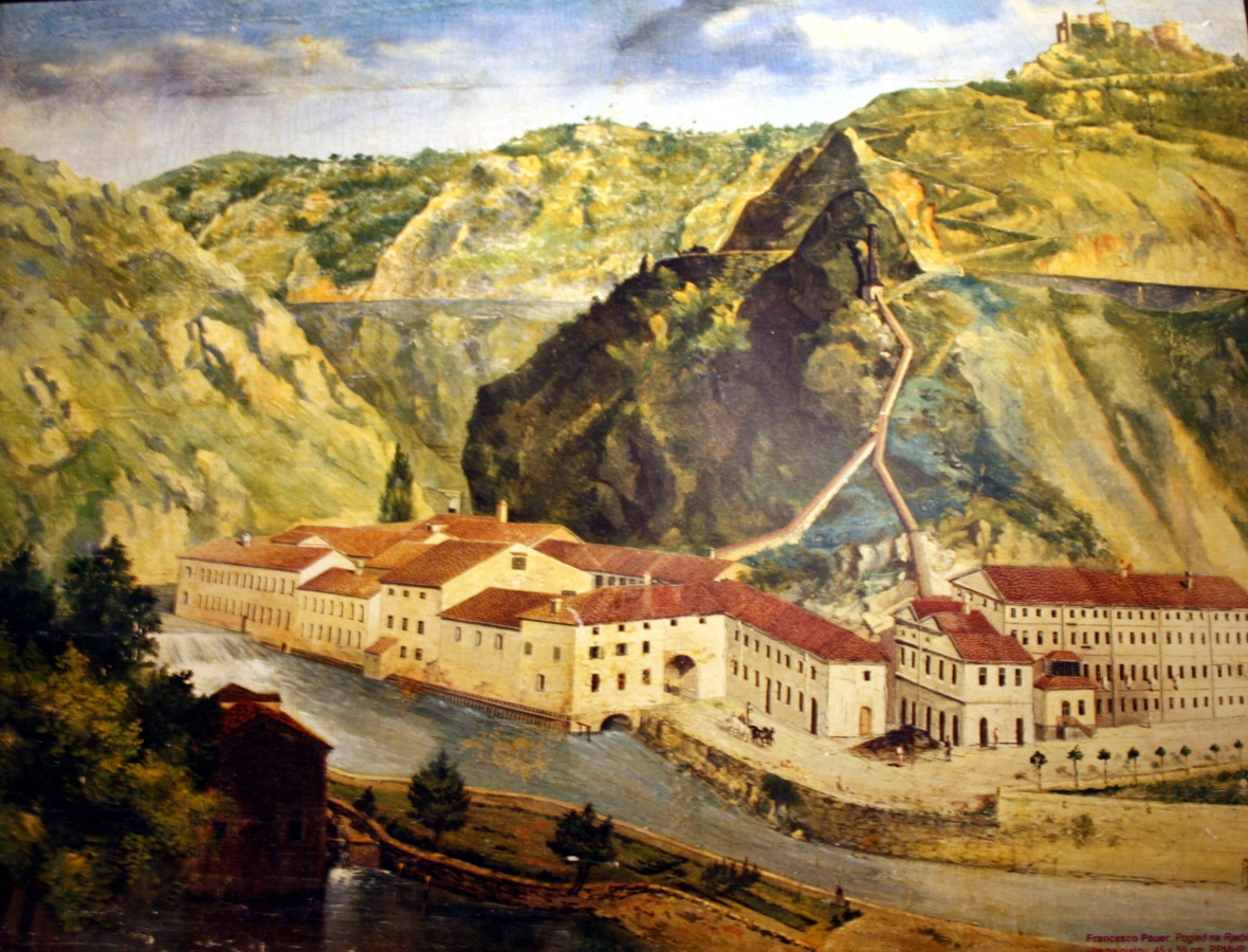 Pogled na Rječinu, ulje na platnu